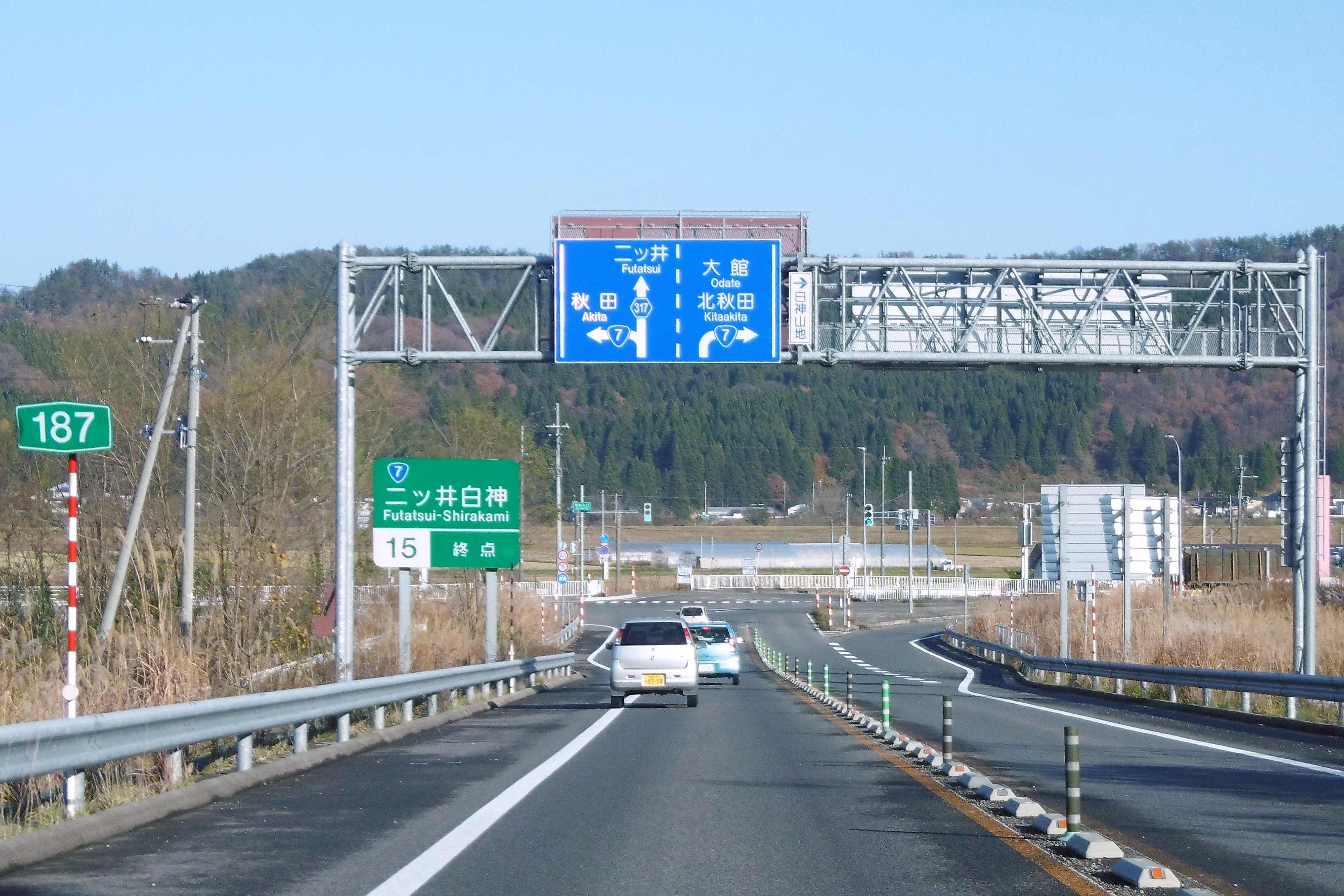 二ツ井白神インターチェンジ出入口付近